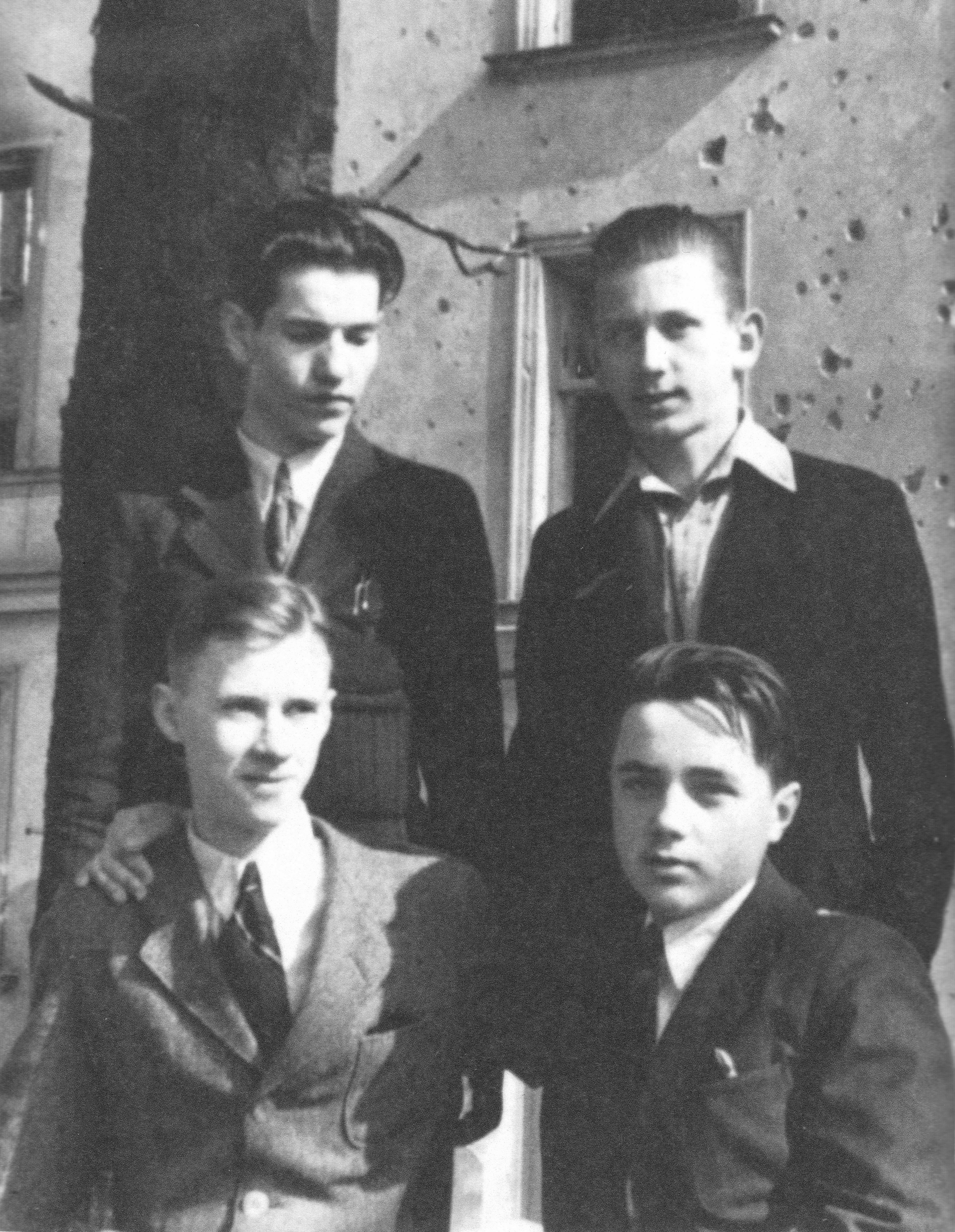 Miron Białoszewski i Stanisław Swen Czachrowski (u dołu od lewej) z kolegami podczas okupacji